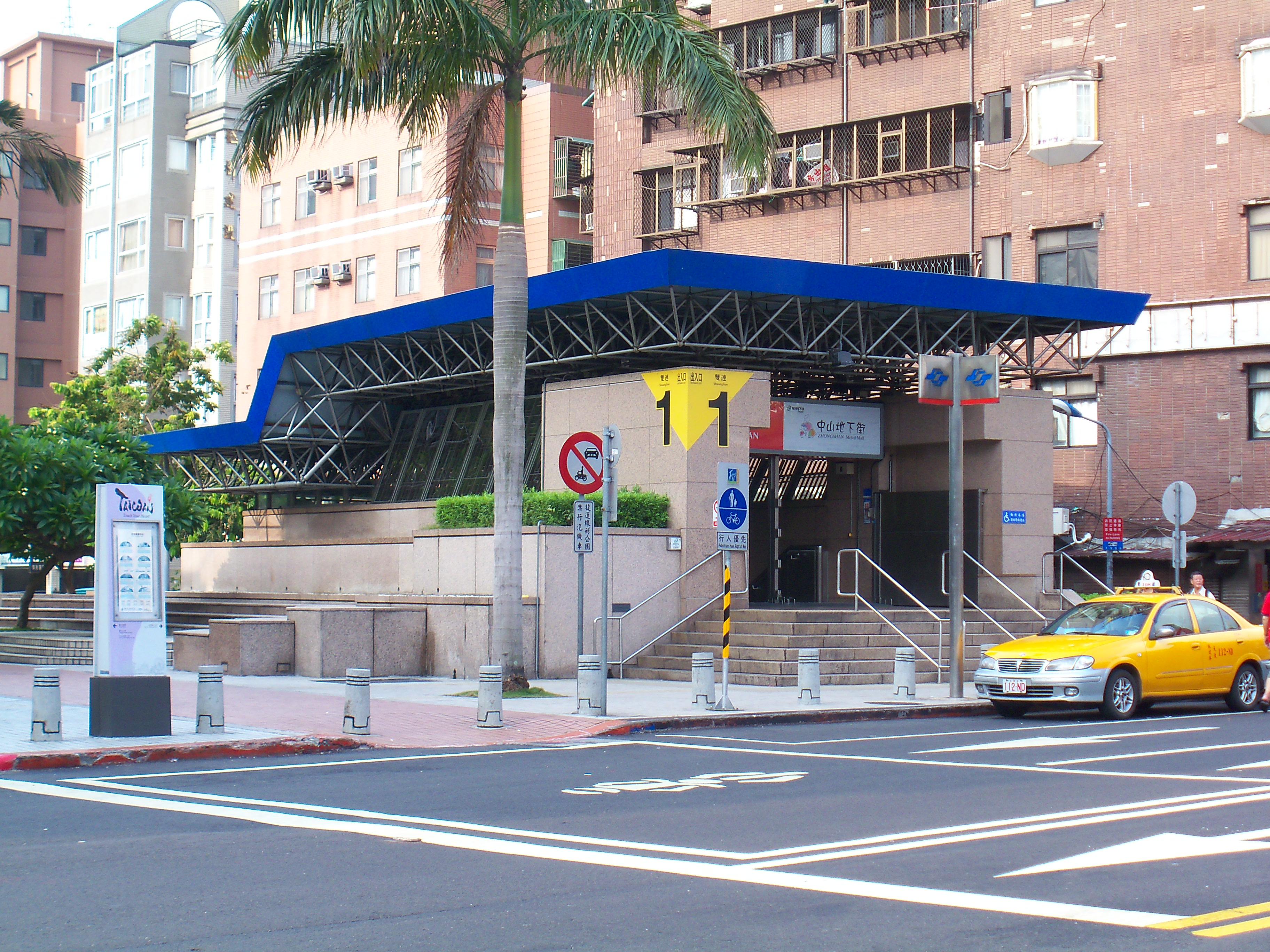 台北捷運淡水線双連駅1号出口。